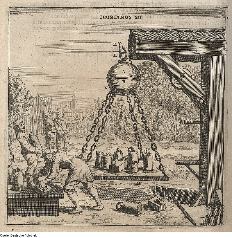 Original image description from the Deutsche Fotothek Physik & Vakuumtechnik & Luftdruck